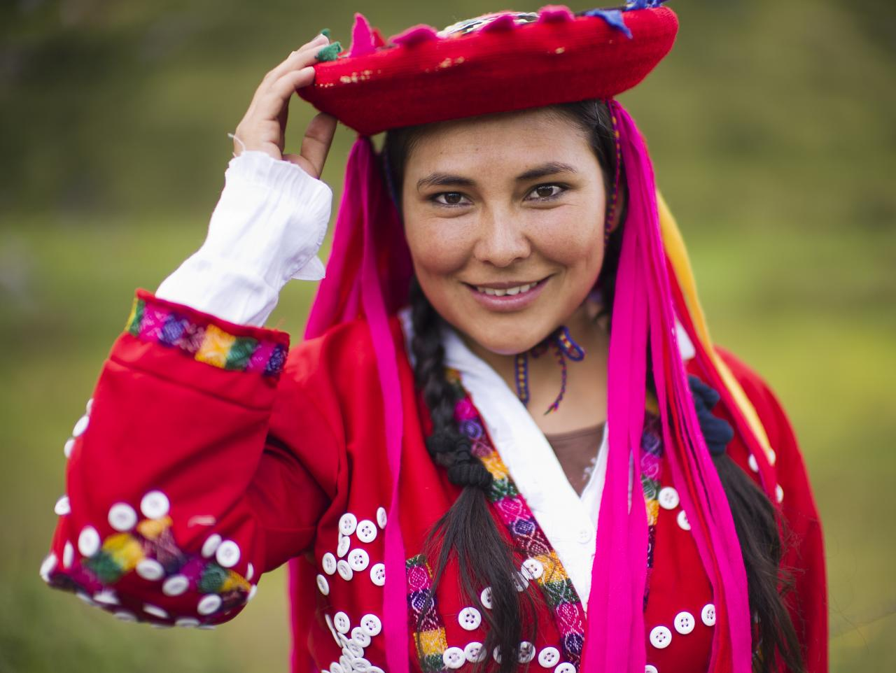 magical peru